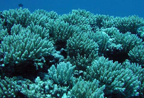 Acropora sp.